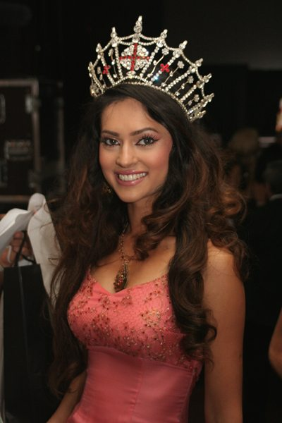 Hammasa Kohistani during Miss England 2006